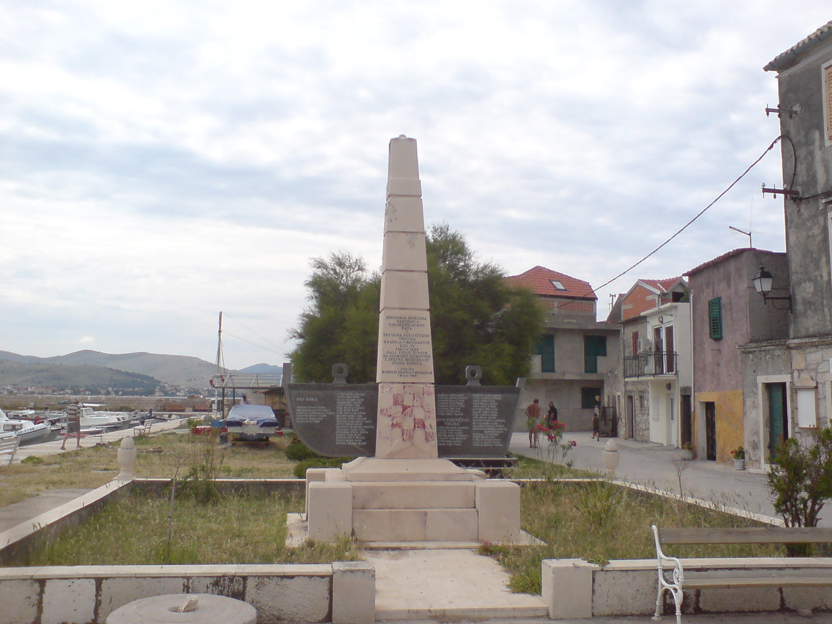 Monument on Krapanj island, near Šibenik (Croatia)